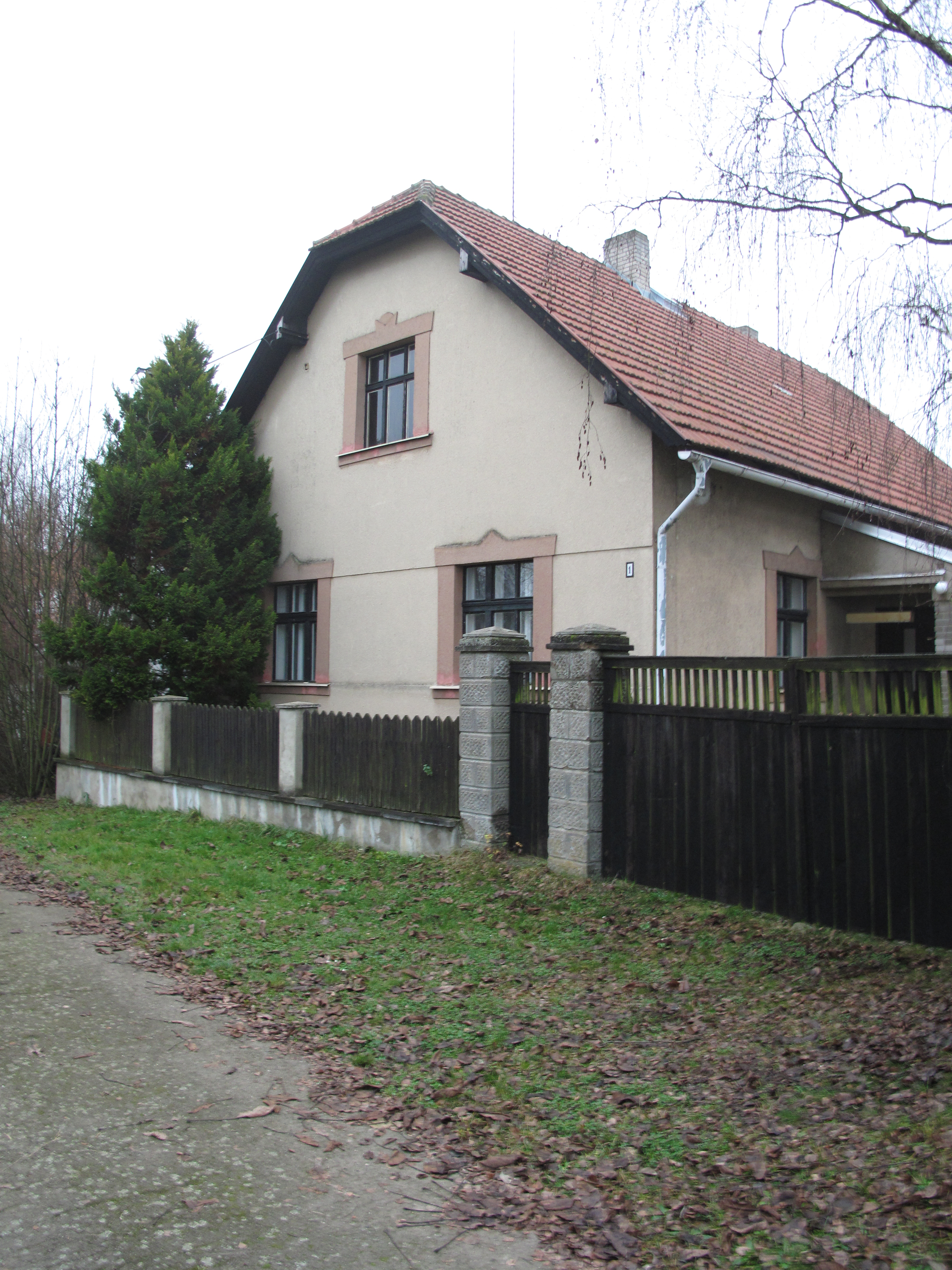 Dům v Nové Vsi. Okres Rakovník, Česká republika.